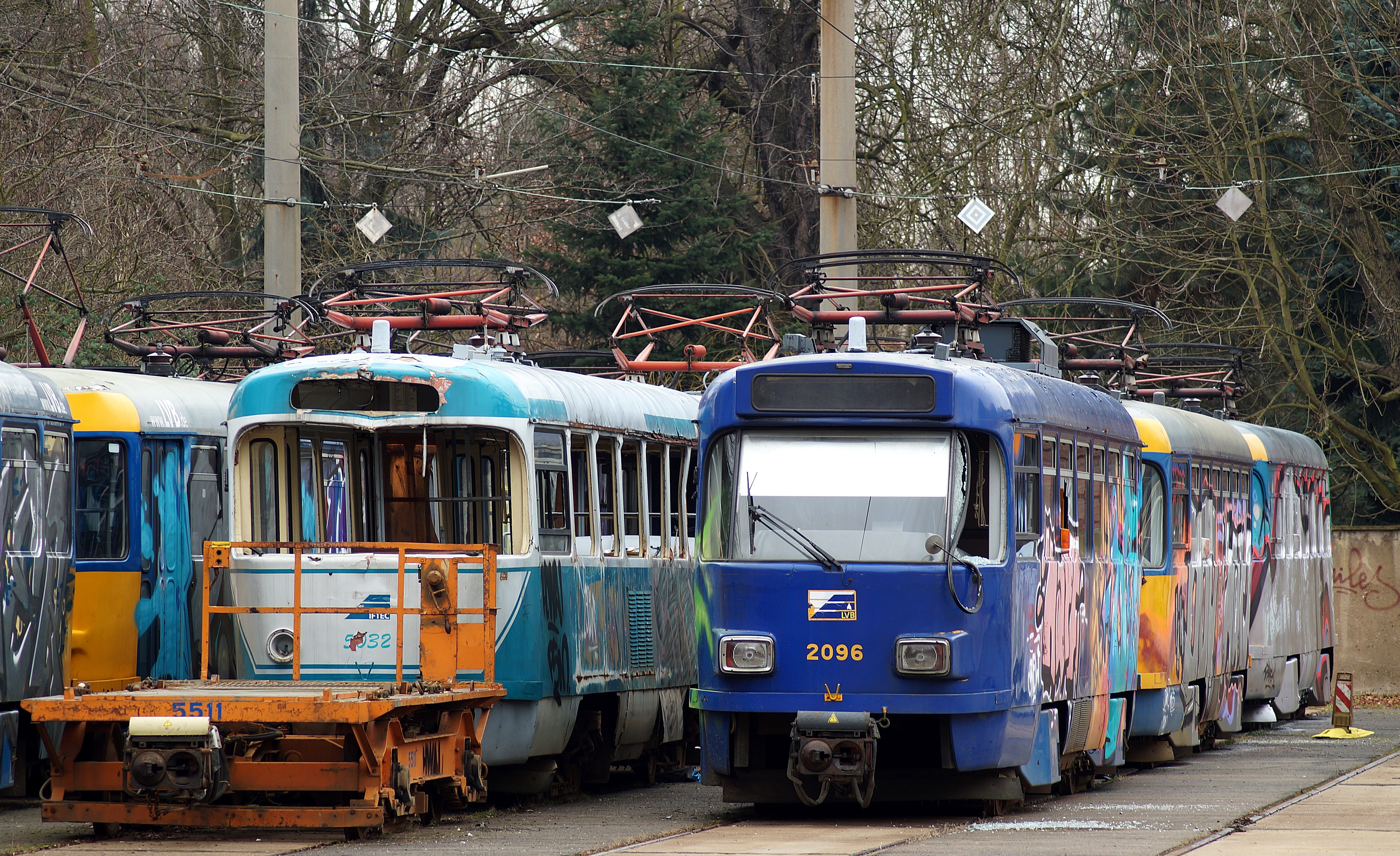 Abgestellte TW im Straßenbahnhof Leutzsch.Die Wagen 5511 und 5032 (33a) links gehörten bis zur Ausmusterung zum Materialzug, der Wagen 2096 ist mit dem Umrichter auf dem Dach und einer Nummer unter 2100 einer der wenigen des Typs 33e.